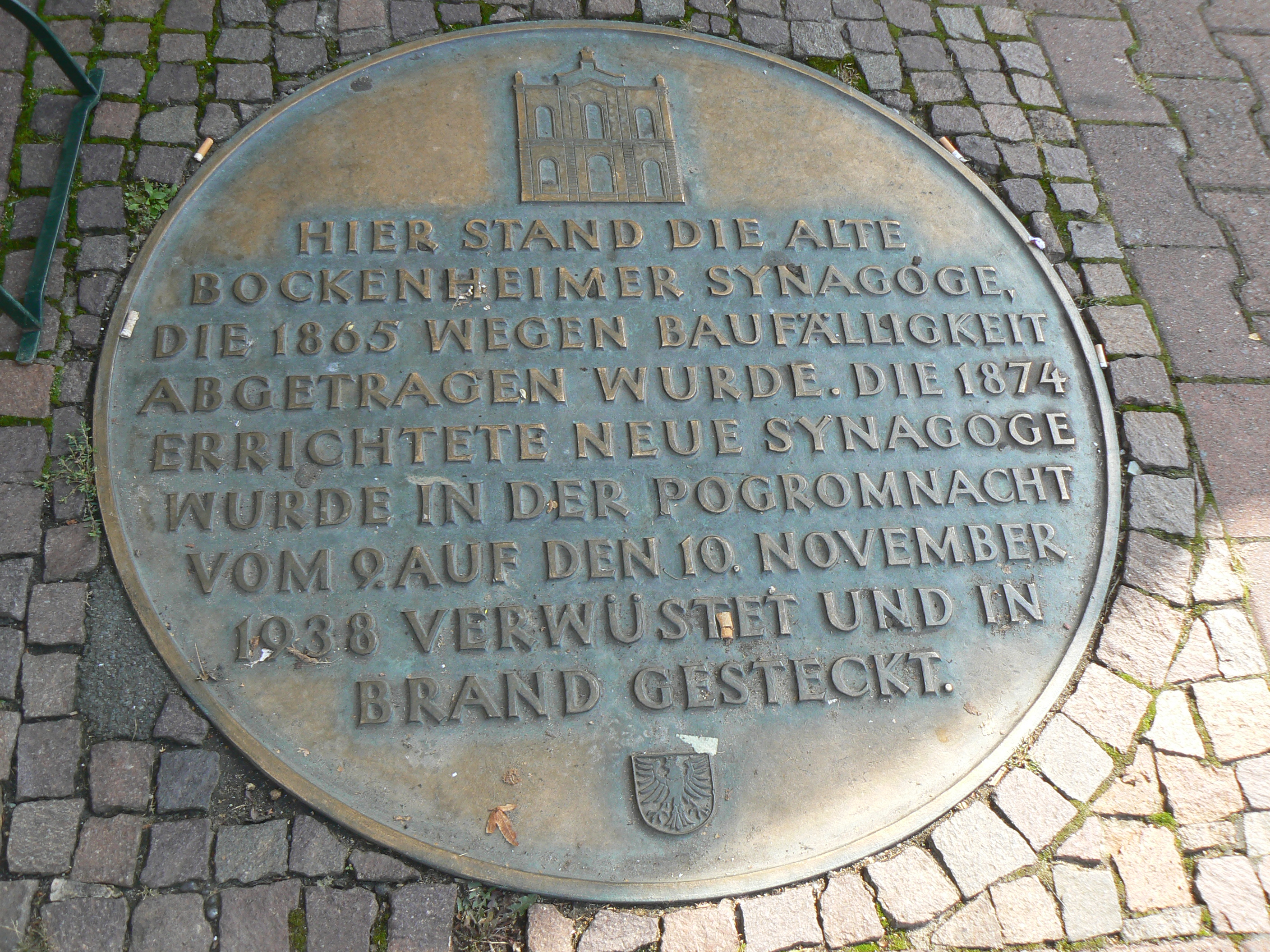 Gedenkplatte für die am 9.und 10.11.1938 hier zerstörten Bockenheimer "neuen" Synagoge, von Bildhauer Willi Schmidt (geb.1924), aufgestellt am 03.11.1988, Standort Frankfurt Bockenheim Schloßstraße 3-5